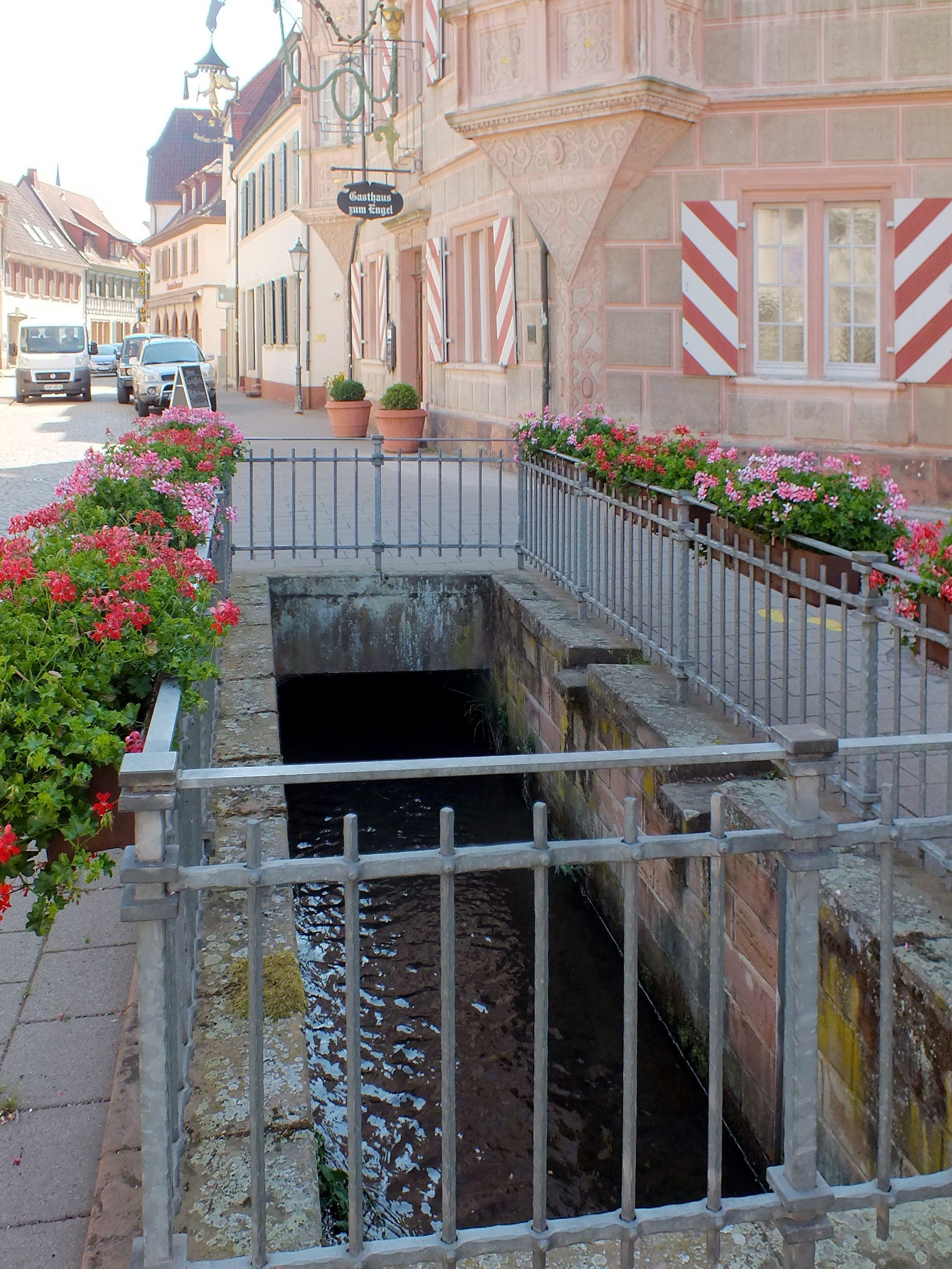 Der unterirdisch durch Bad Bergzabern geführte Erlenbach (im Stadtgebiet auch Woodbach genannt), ist in der Königsstraße am ehemaligen Gasthof zum Engel einsehbar.